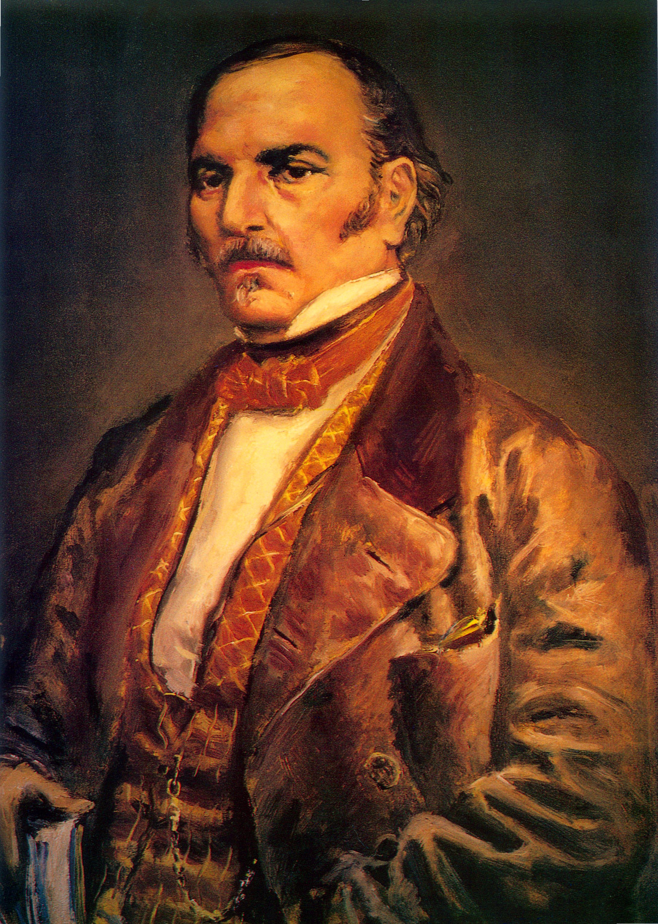 Namalowany portret Allana Kardeca